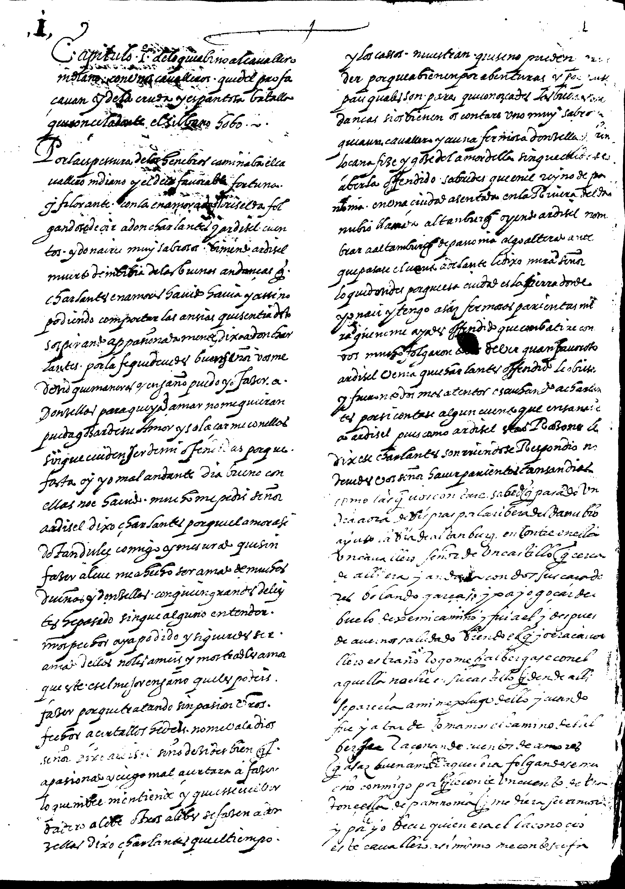 Jerónimo Jiménez de Urrea, Don Clarisel de las Flores, vol. 2. Manuscrito del siglo XVI, conservado en la Biblioteca de la Universidad de Zaragoza (España)